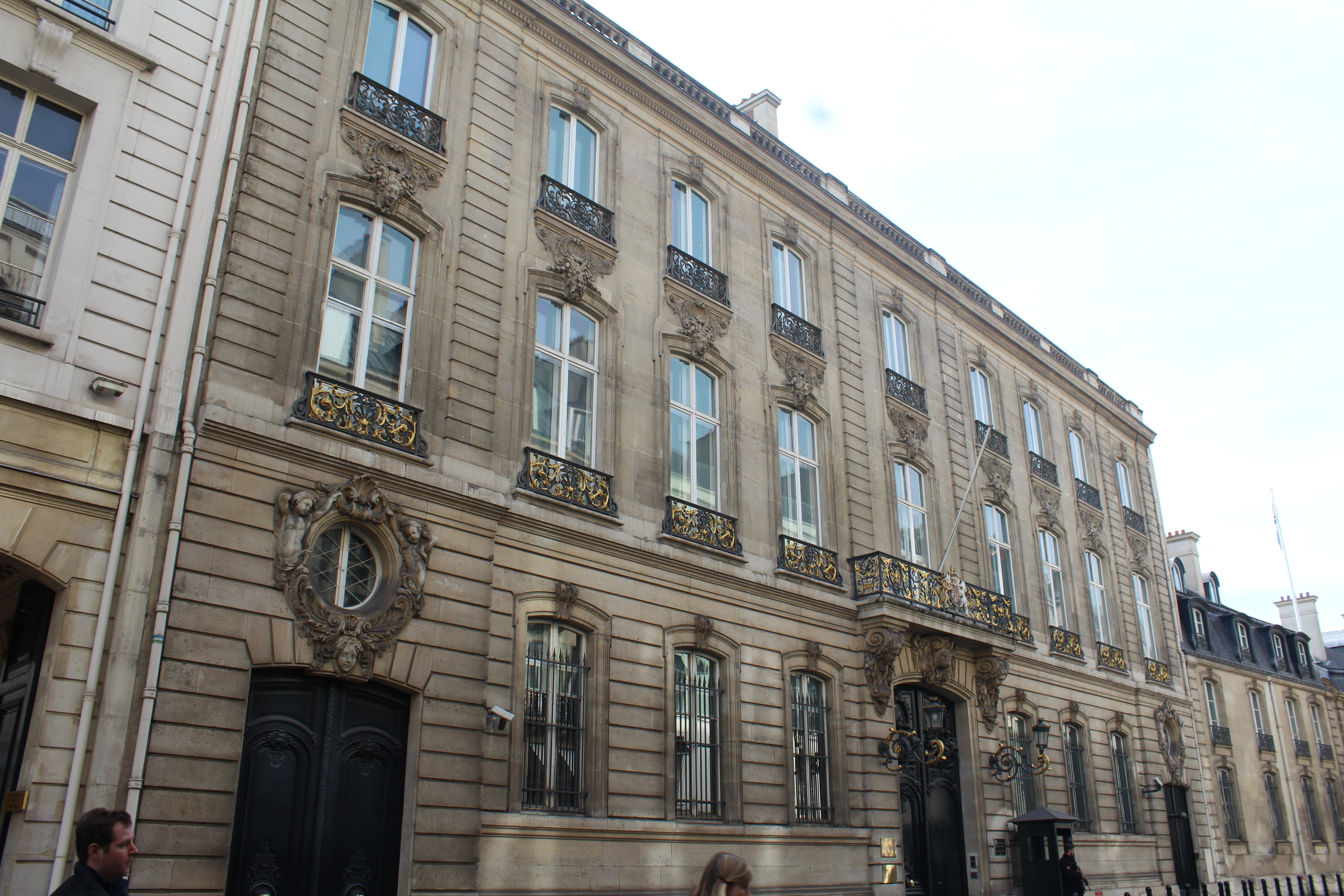 Ambassade du Royaume-Uni à Paris.